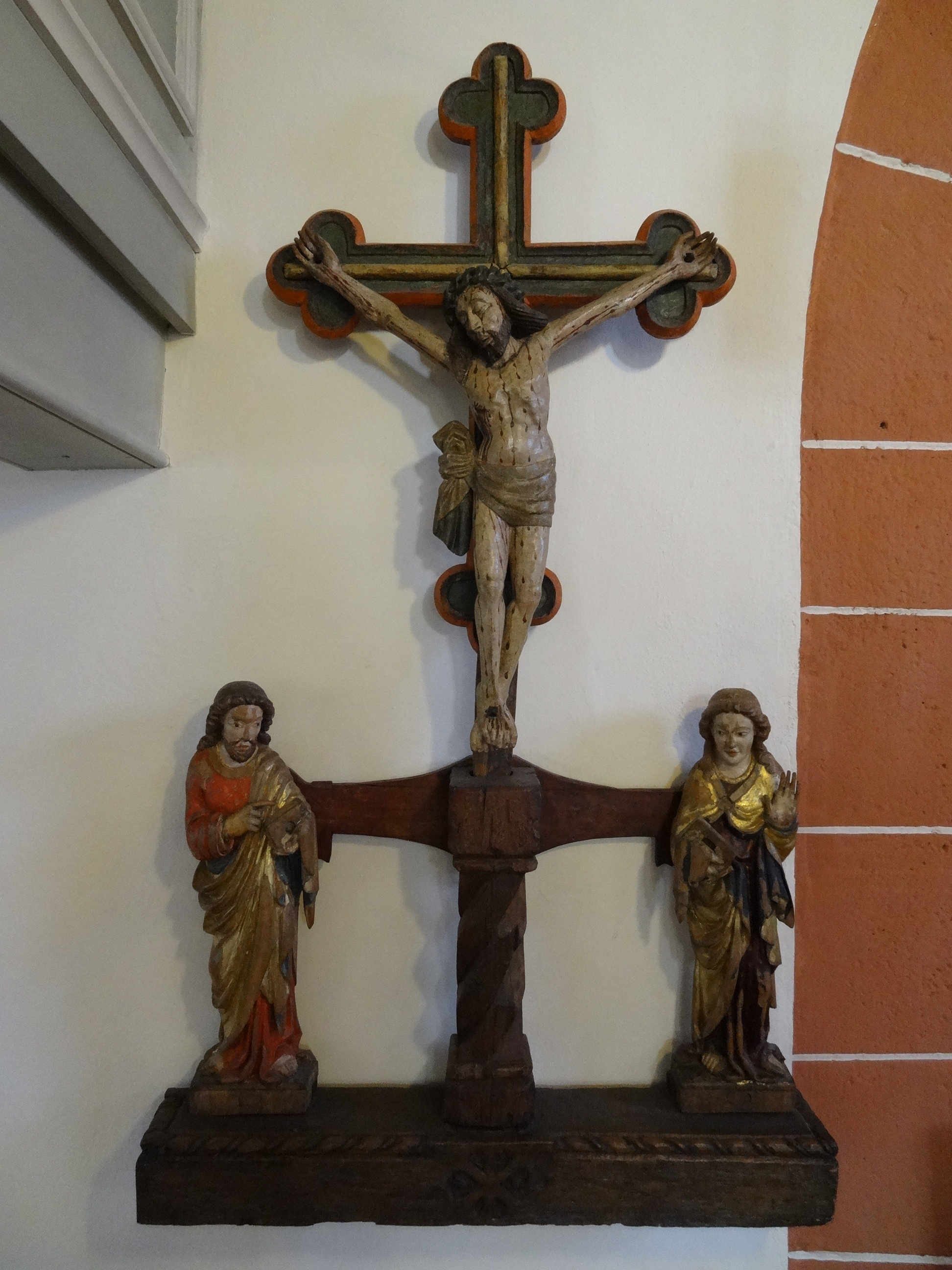 Evangelische Kirche Hausen (Pohlheim)